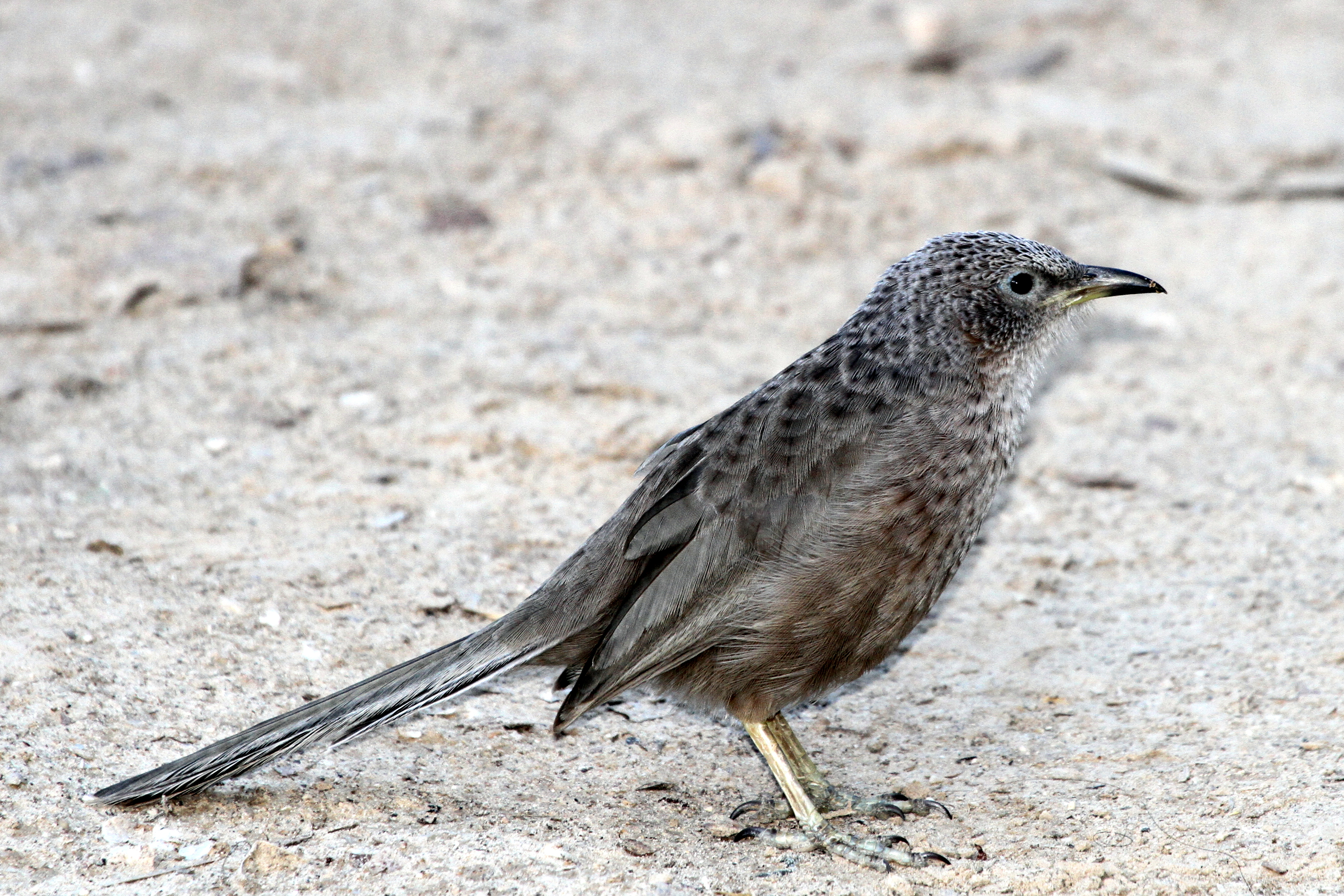 Arabian babbler Israel